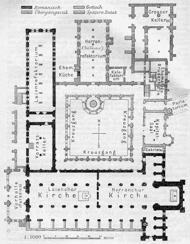 Kloster Maulbronn Plan - Public Domain - Quelle: Baedekers S�d-Deutschland von 1913 22:36, 22. Feb 2004 Stefan Kühn 623 x 800 (135479 Byte) (Kloster Maulbronn Plan - Public Domain - Quelle: Baedekers Süd-Deutschland von 1913)